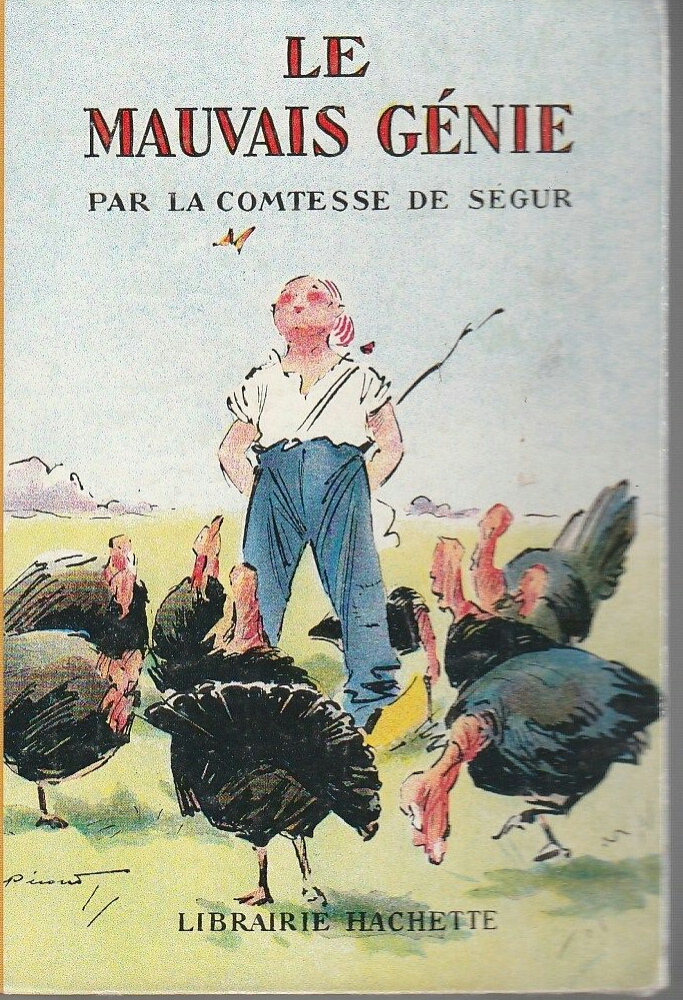 Comtesse de Ségur, Le Mauvais Génie, illustrations A. Pécoud.